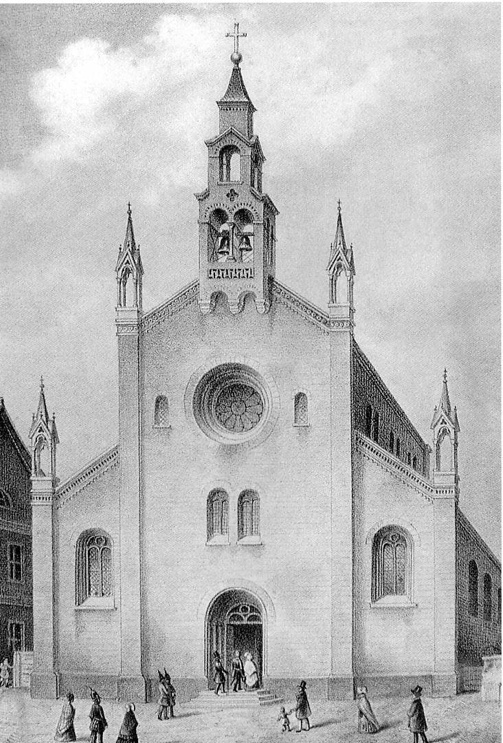 Die Kirche St. Marien am Behnitz in Berlin-Spandau, Stich von 1848. Reproduktion: Manfred Brückels.